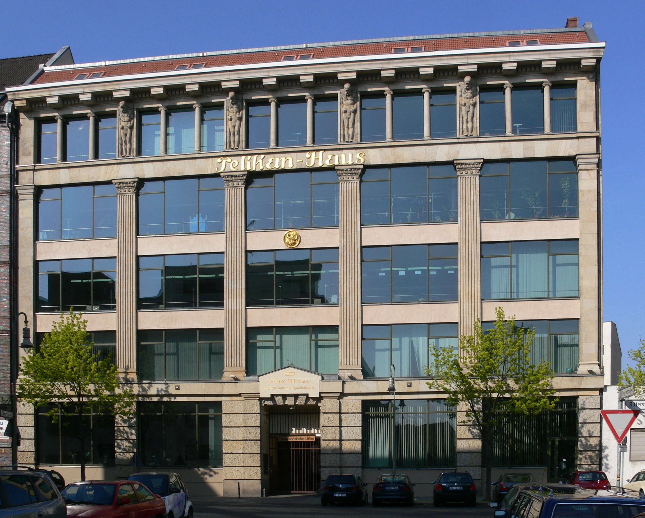 Berlin-Kreuzberg, Ritterstraße Pelikanhaus, Ritterstraße 9/10, erbaut 1901/1902 von Kurt Berndt und L. Lange